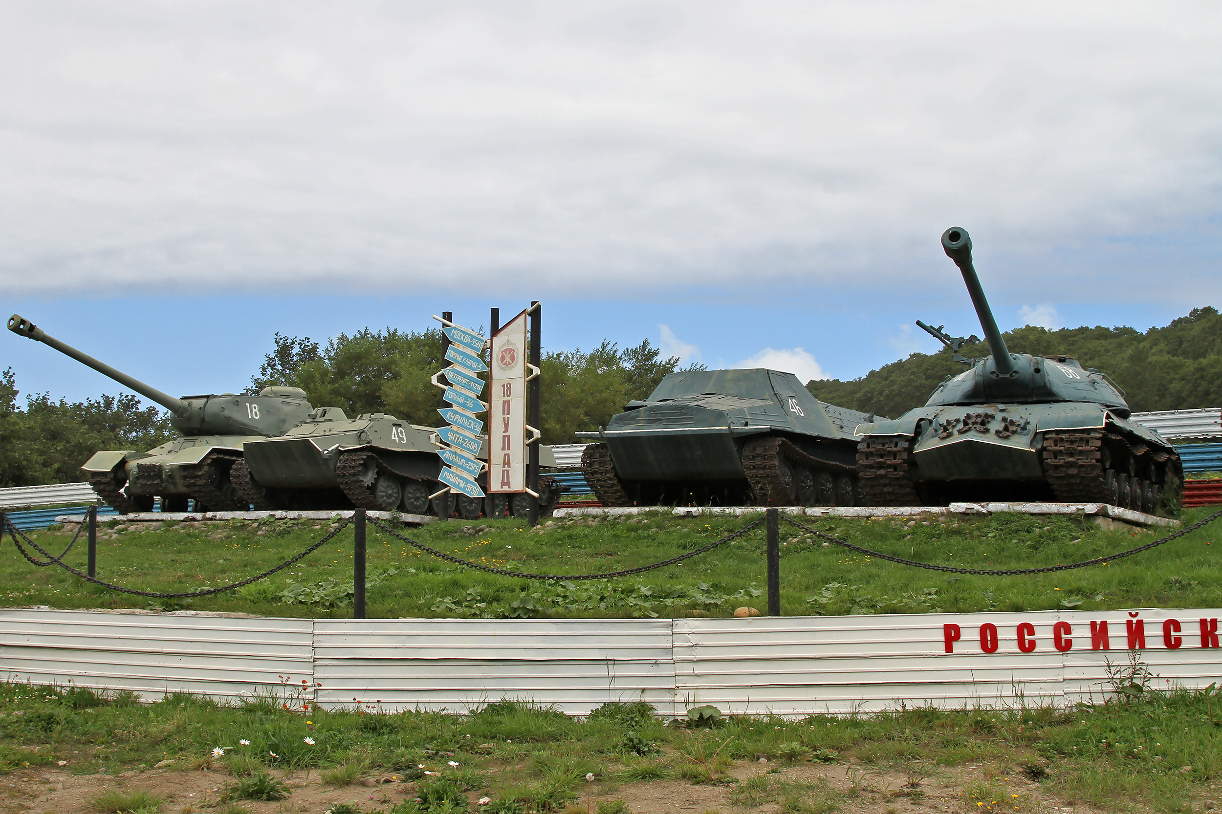 Монумент 18-й пулемётно-артиллерийской дивизии